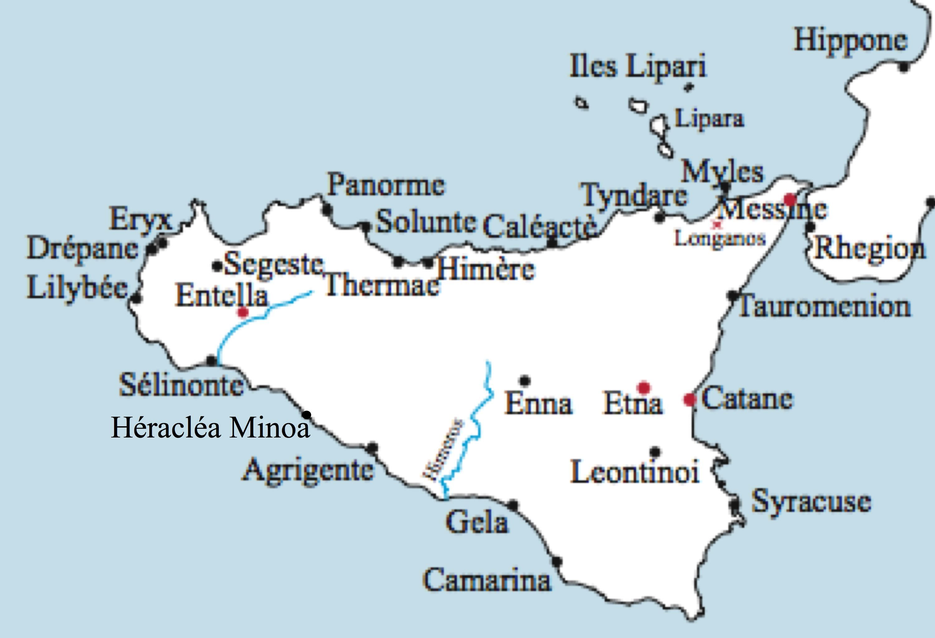 Carte des principales villes de Sicile pouvant être utilisée pour la première guerre punique.